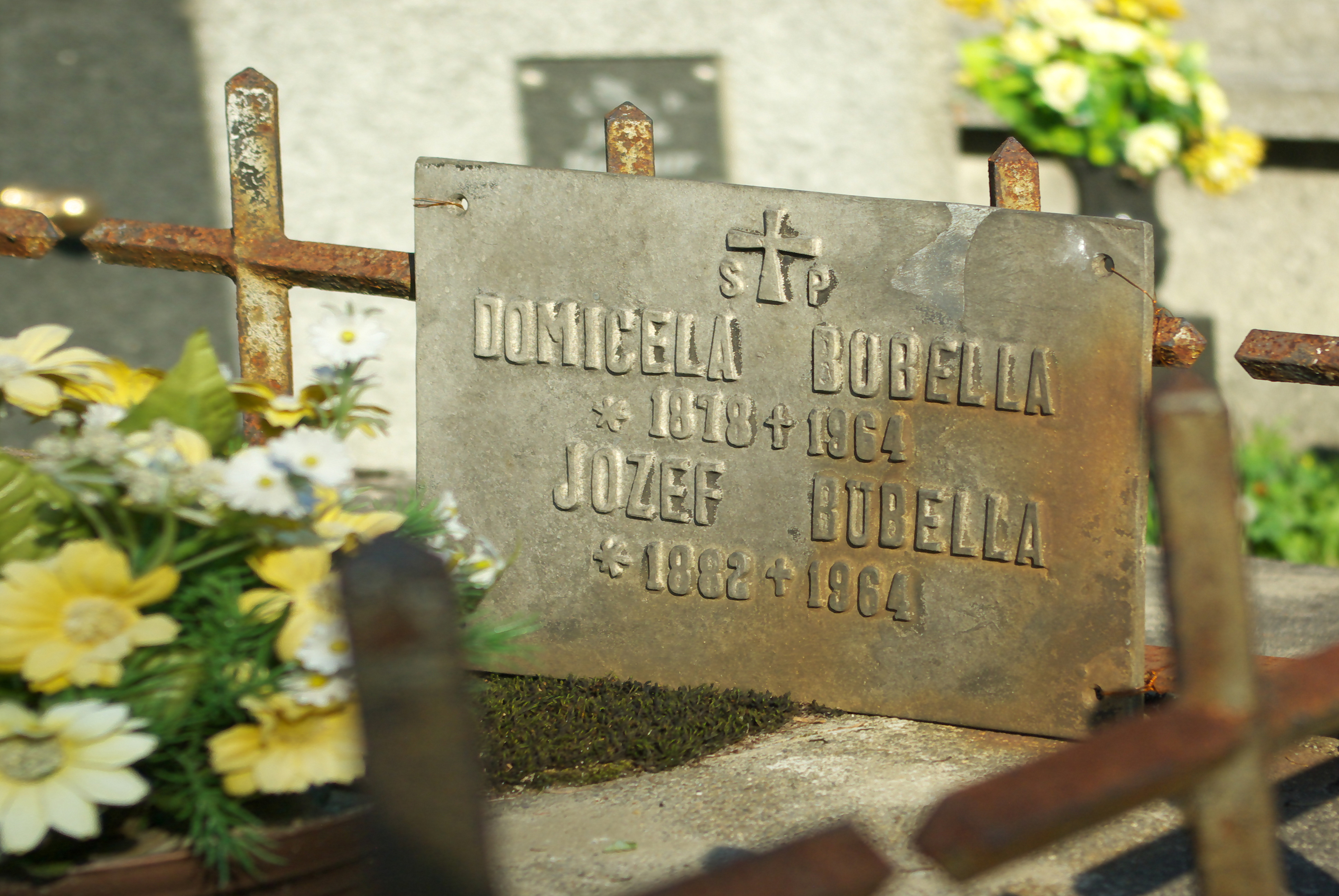 Grobowiec rodzin Bornstedt i Bubella w części Matejki Stary Cmentarza Centralnego w Sanoku.